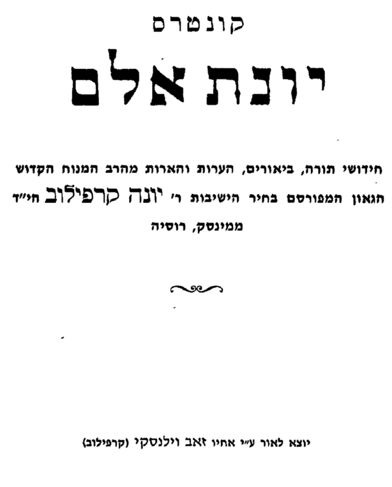 צילום דף השער של הספר "יונת אלם"